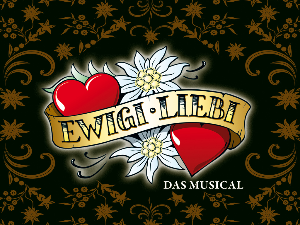 Logo des Musicals Ewigi Liebi